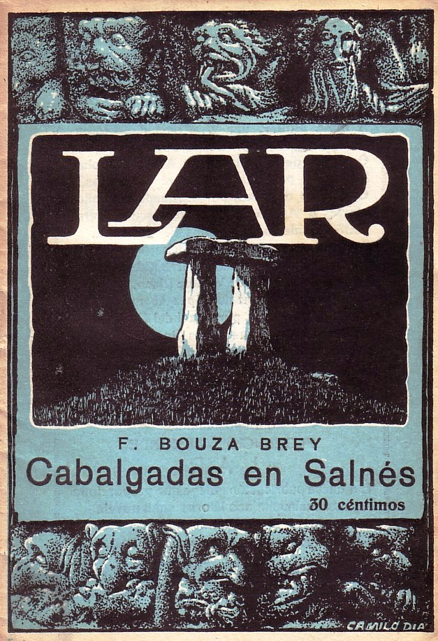 Cabalgadas en Salnés de Fermín Bouza-Brey, A Cruña, Lar, 1925